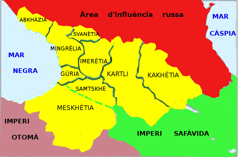 1478-1490, segona partició del Regne de Geòrgia, amb l'aparició de petits estats vassalls.